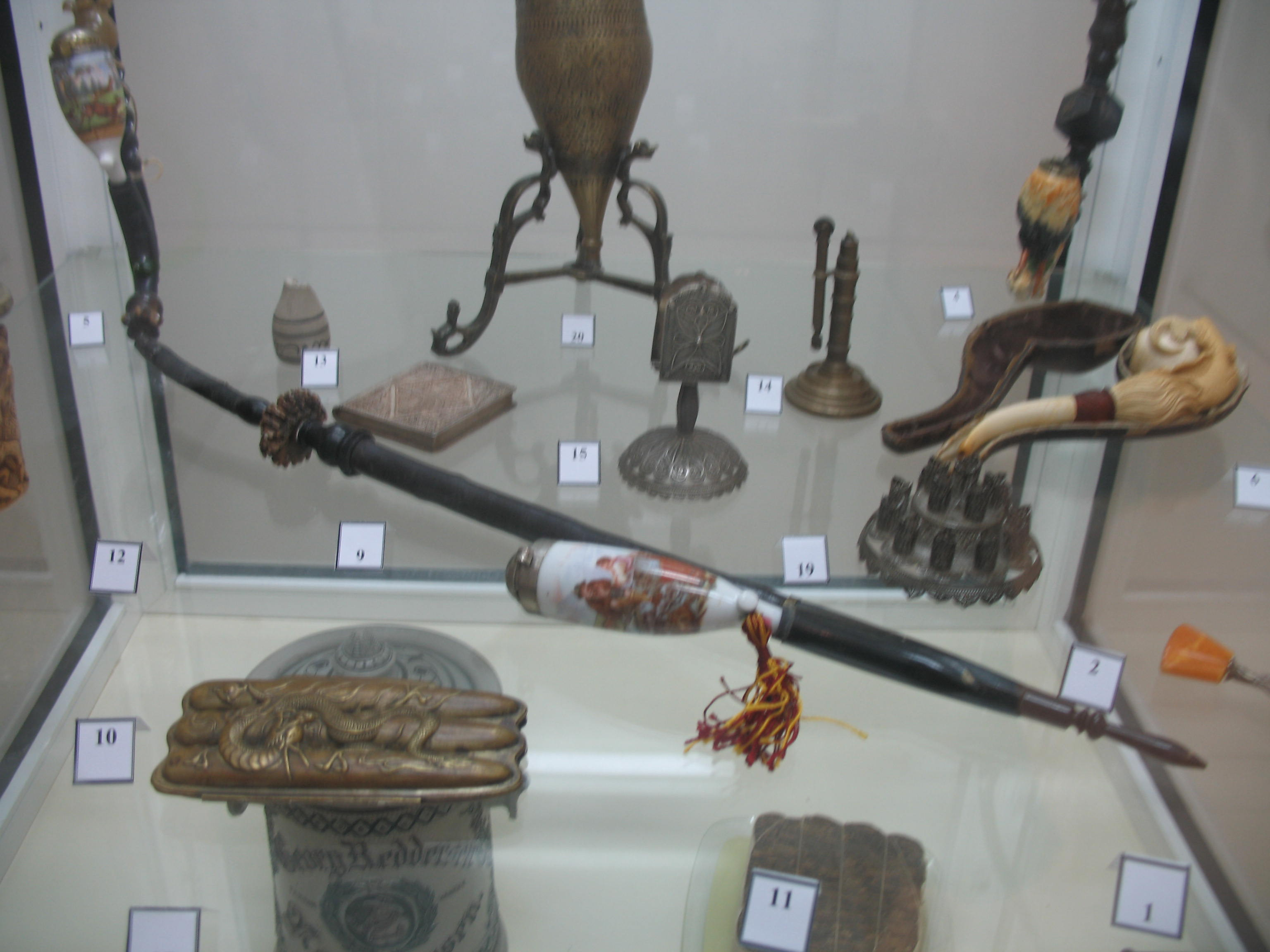 Експонати во Музејот на Тутун од Архивата на Музејот на Тутун, Прилеп.